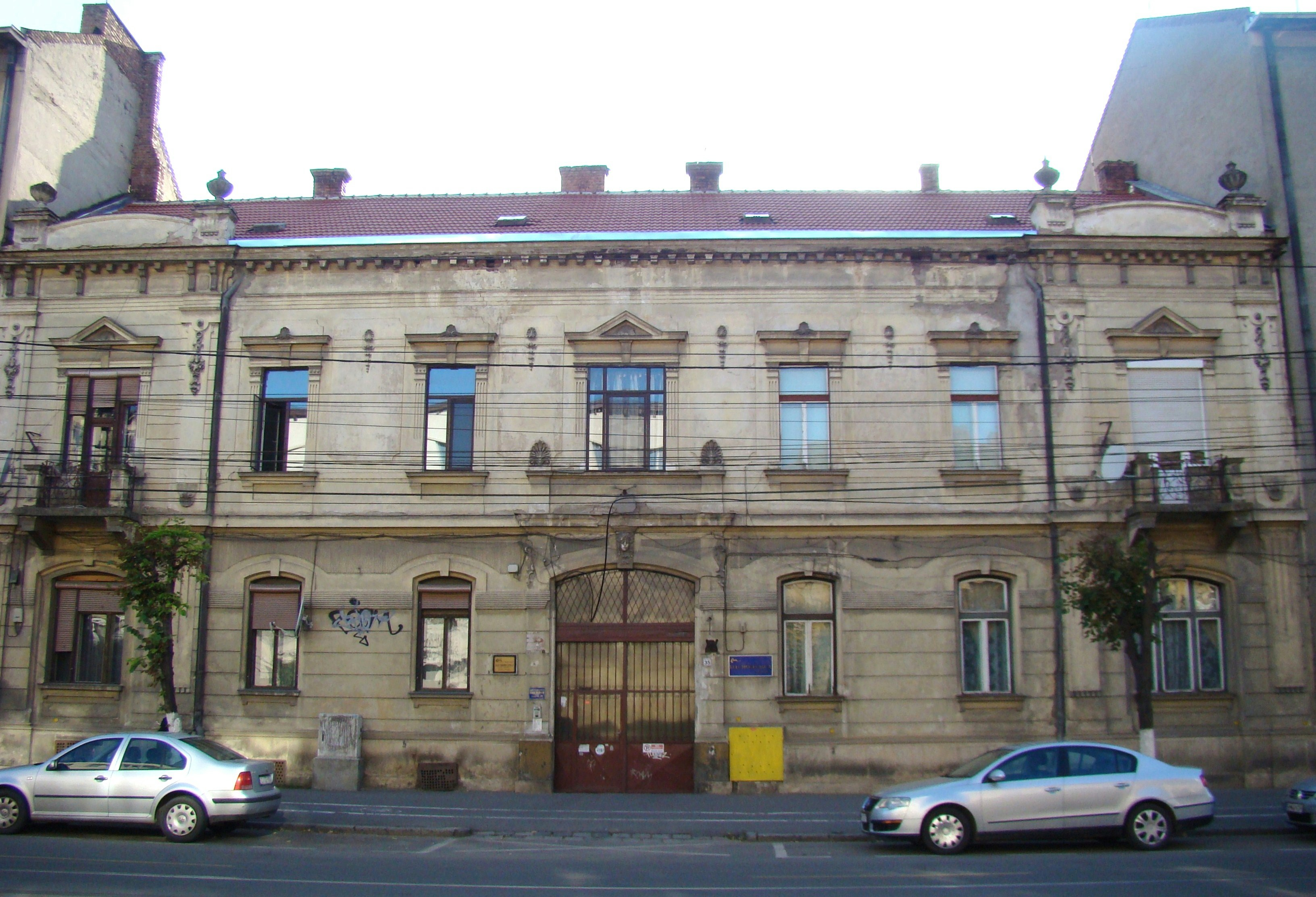 Clădire monument istoric, str.Horea, nr.35